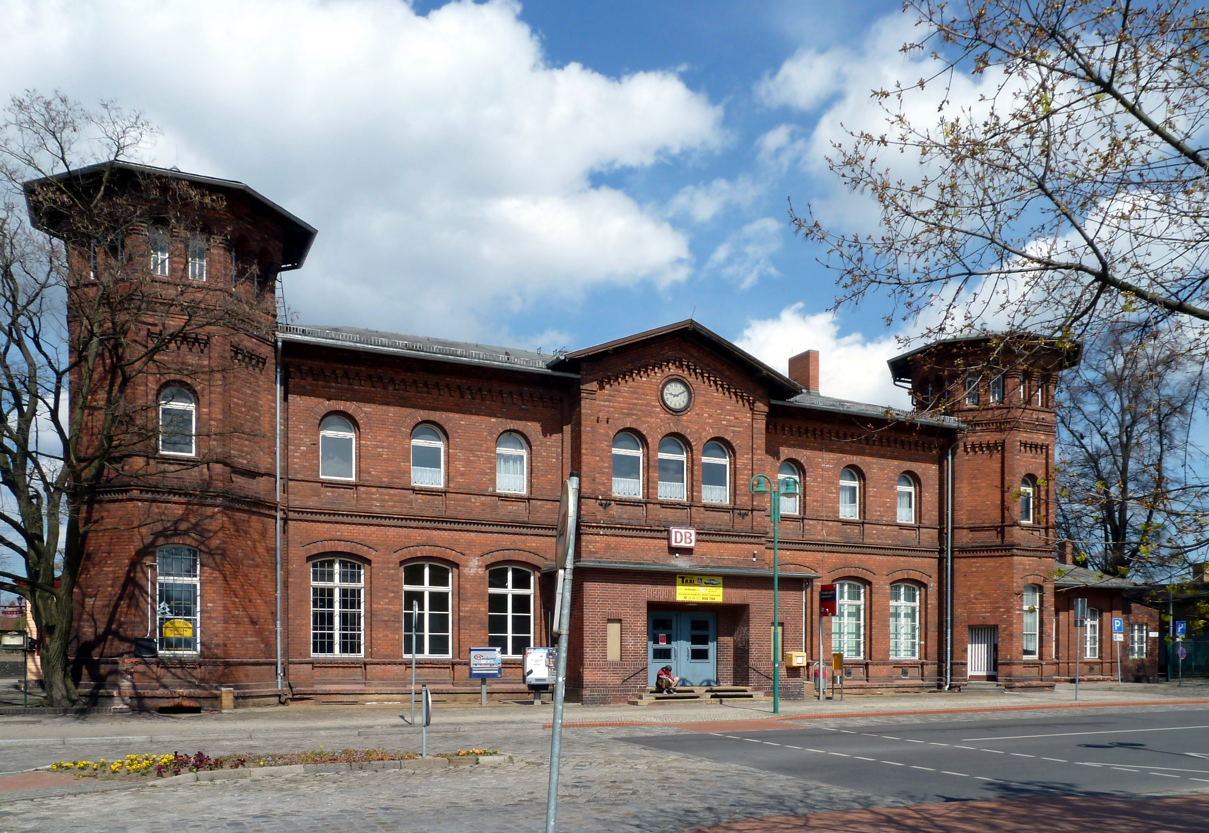 Bahnhof Finsterwalde, Baudenkmal